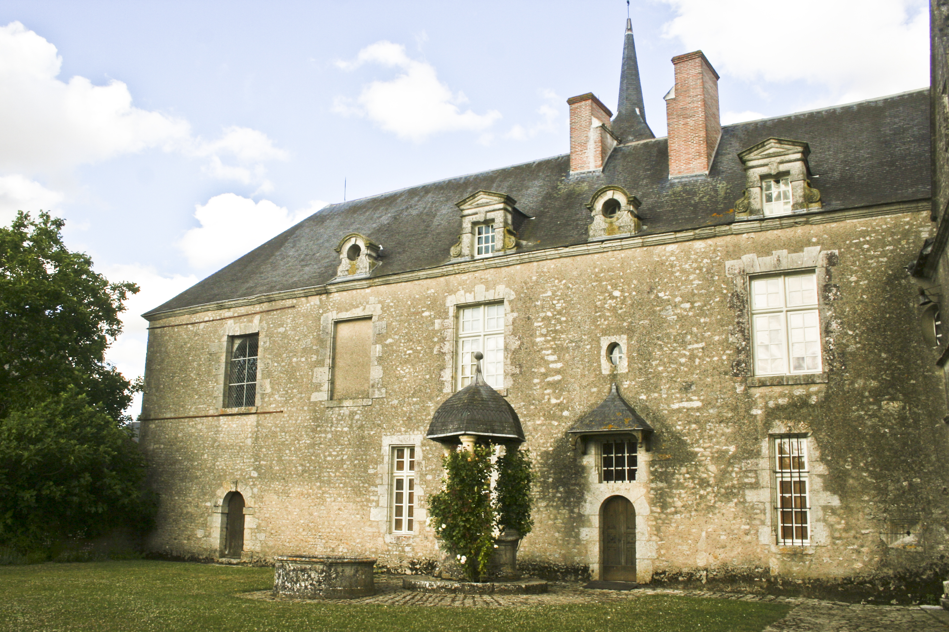 Château de Talcy (Loir-et-Cher), aile Est et puits.